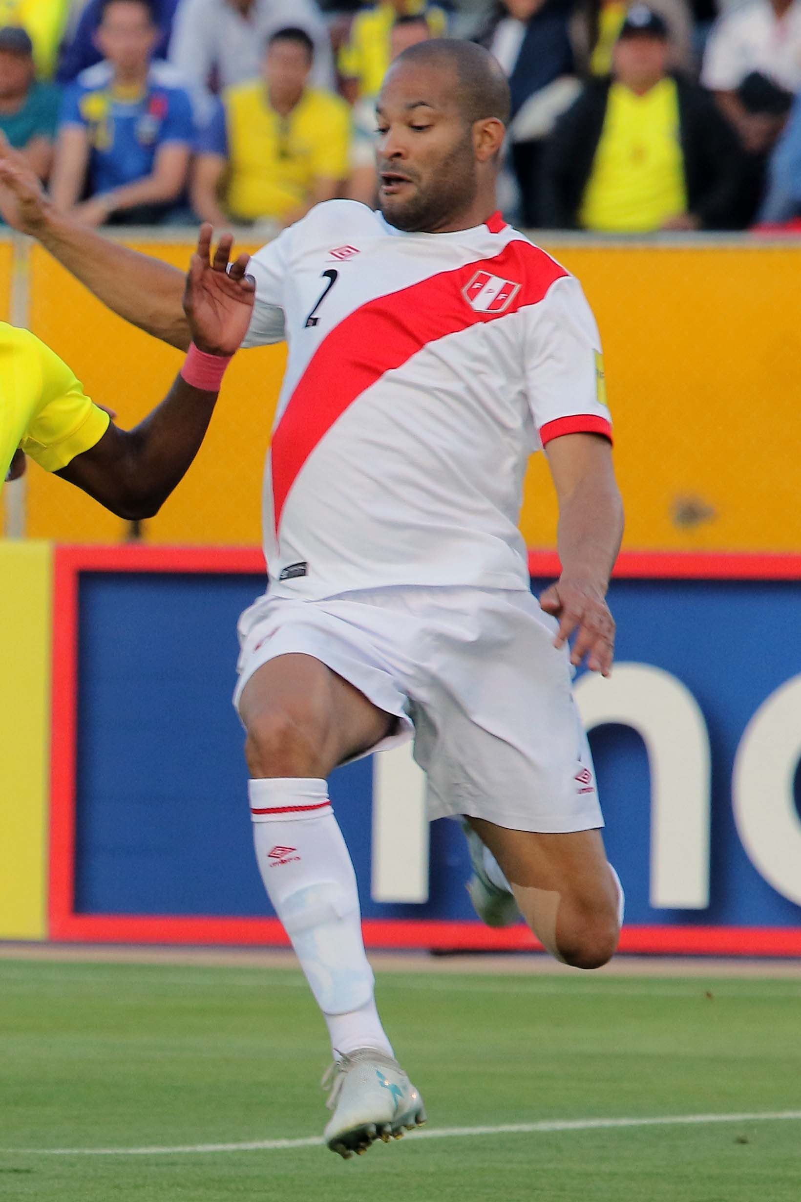 Quito 5 Sep (Andes).- Encuentro por eliminatorias Rusia 2018 entre Ecuador y Perú. Fotografías: Carlos Rodríguez/Andes.